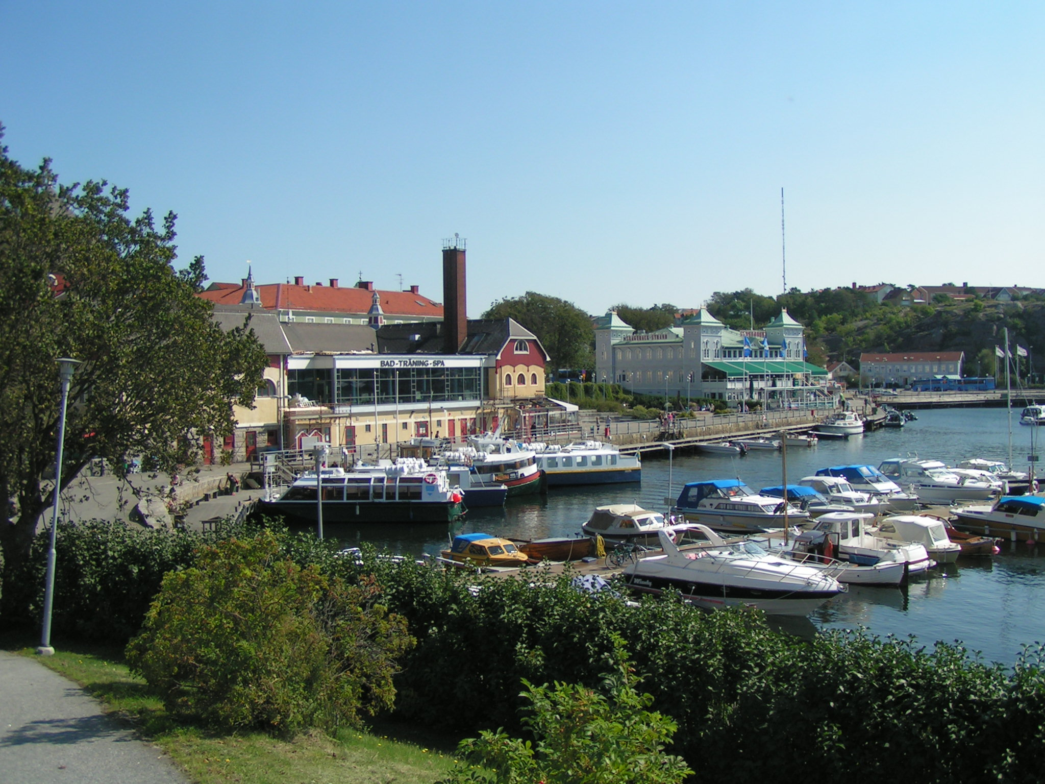 Blick auf den Südhafen von Strömstad